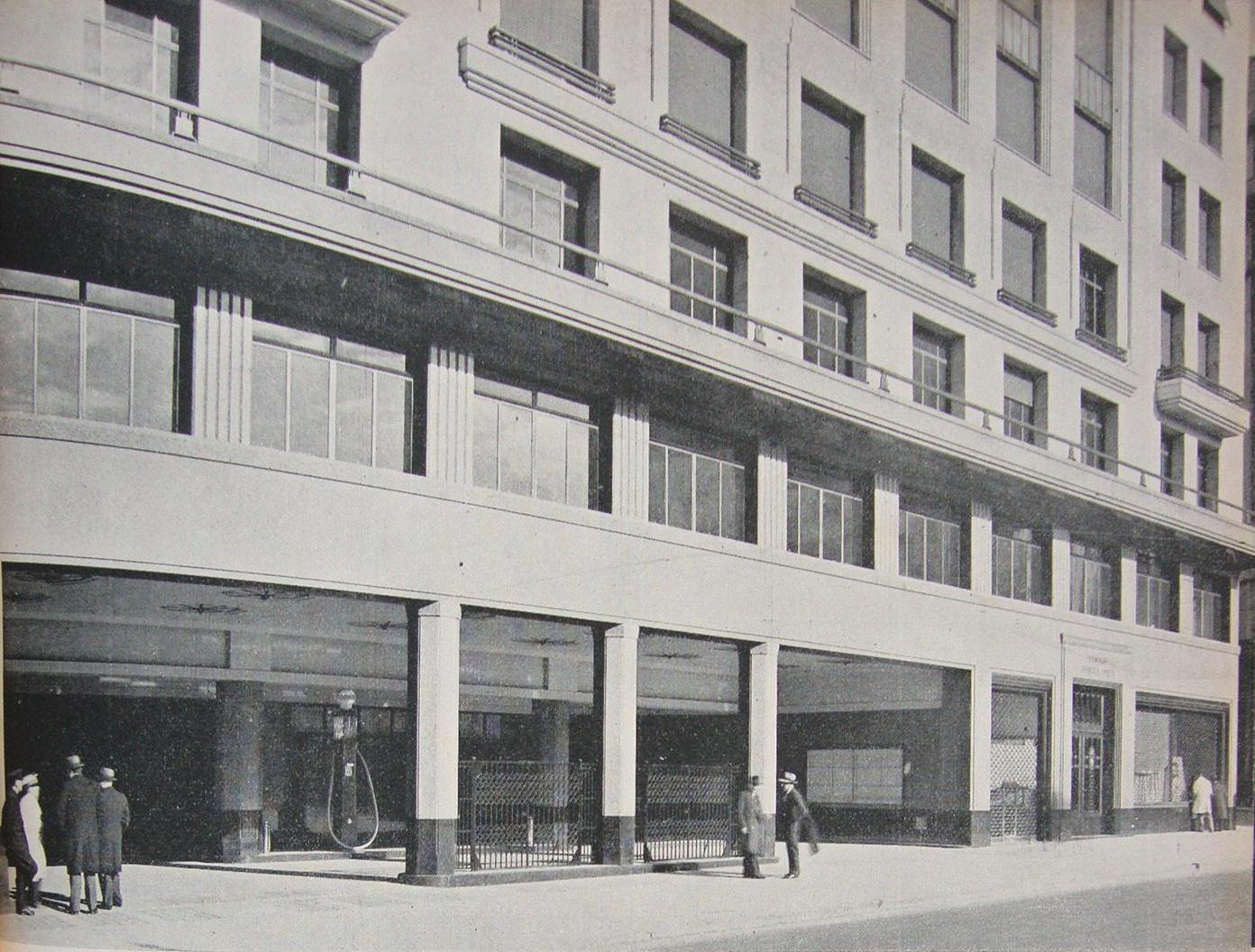 Vista desde la avenida Diagonal Norte del acceso a la estación de servicio que funcionaba en la planta baja del Edificio Shell Mex en Buenos Aires, Argentina.